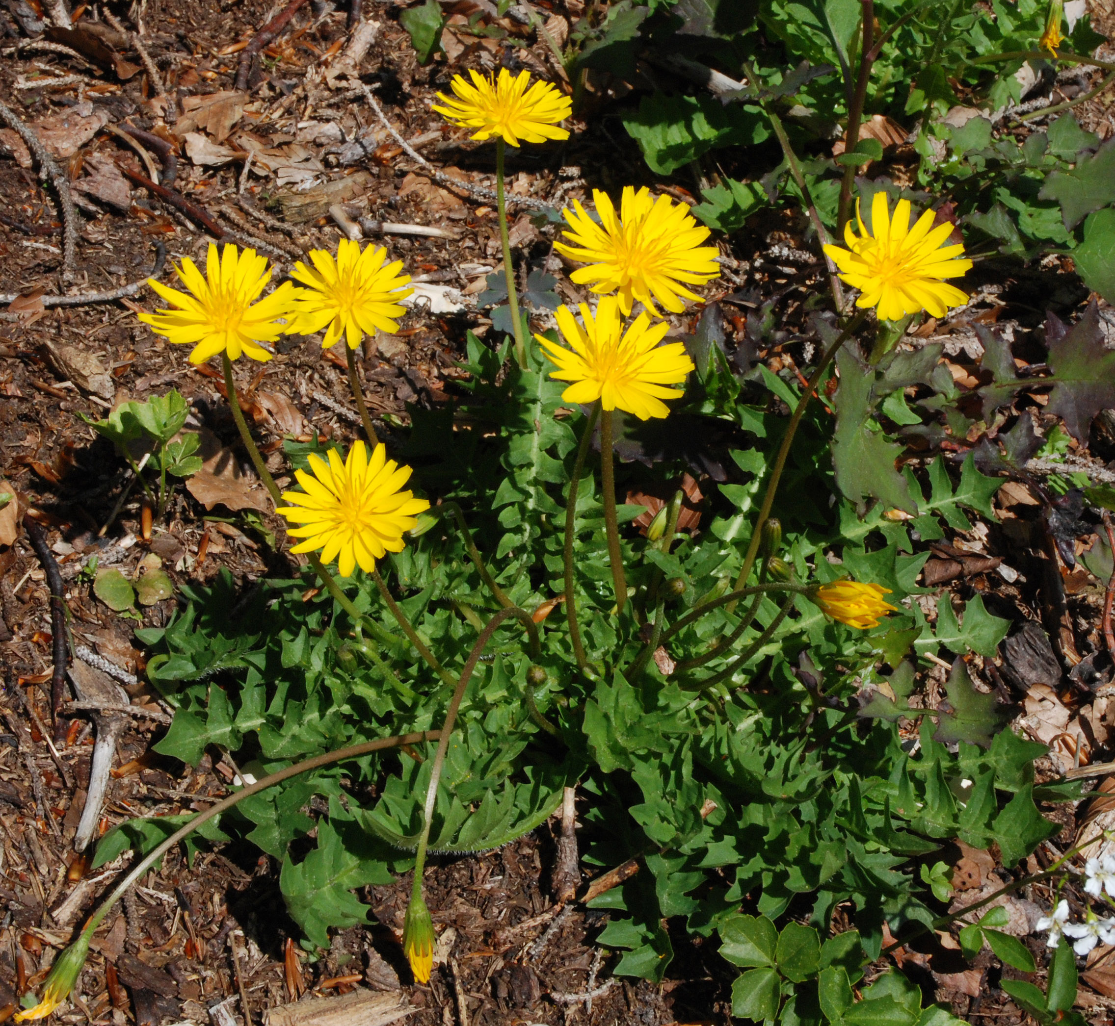 Aposeris foetida , Almkogel/ Mondsee, Austria